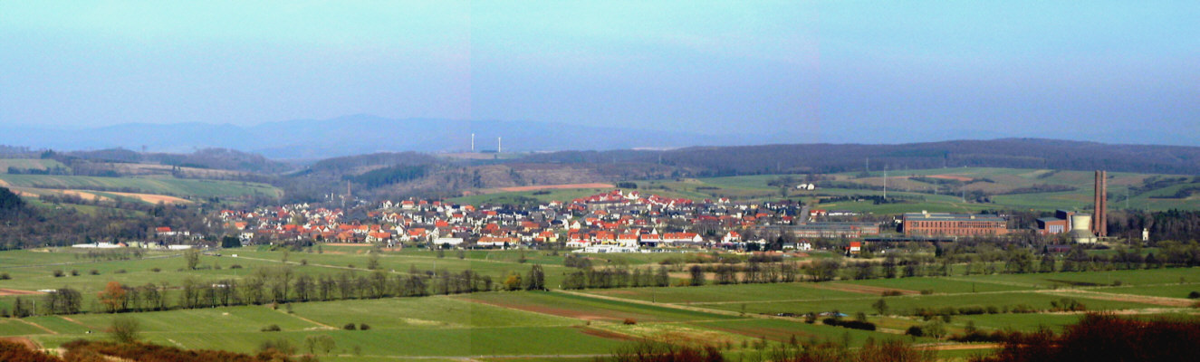 Rhumspringe ist eine Gemeinde der Samtgemeinde Gieboldehausen (Sitz Gieboldehausen) im Landkreis Göttingen in Niedersachsen (Deutschland)